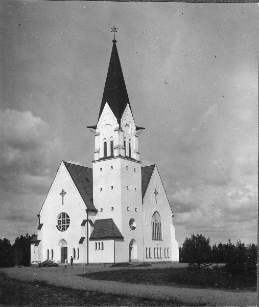 Kyrkan från sydöst.